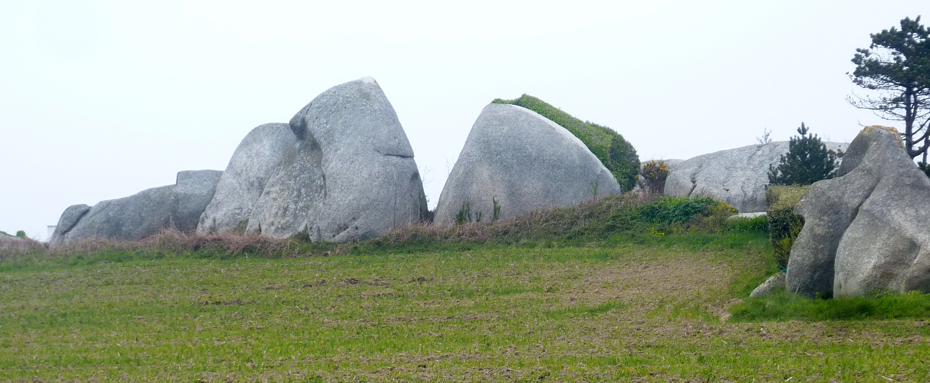 Brignogan : rochers dans la campagne (anciens ilôts rocheux lors de la transgression flandrienne).